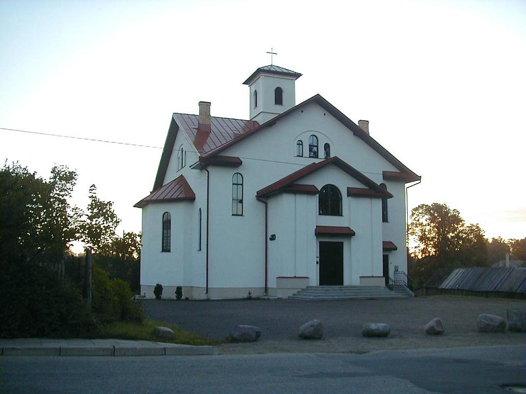 Alūksnes katoļu baznīca 2003-09-06